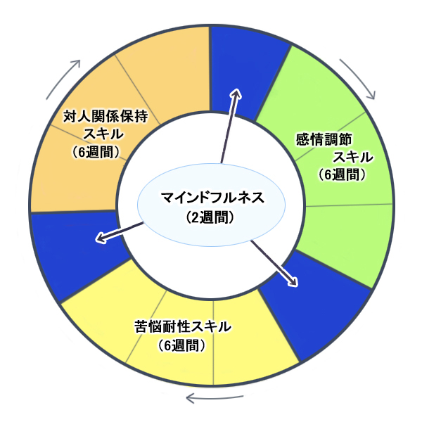 弁証法的行動療法における、集団スキルトレーニングのサイクル表。